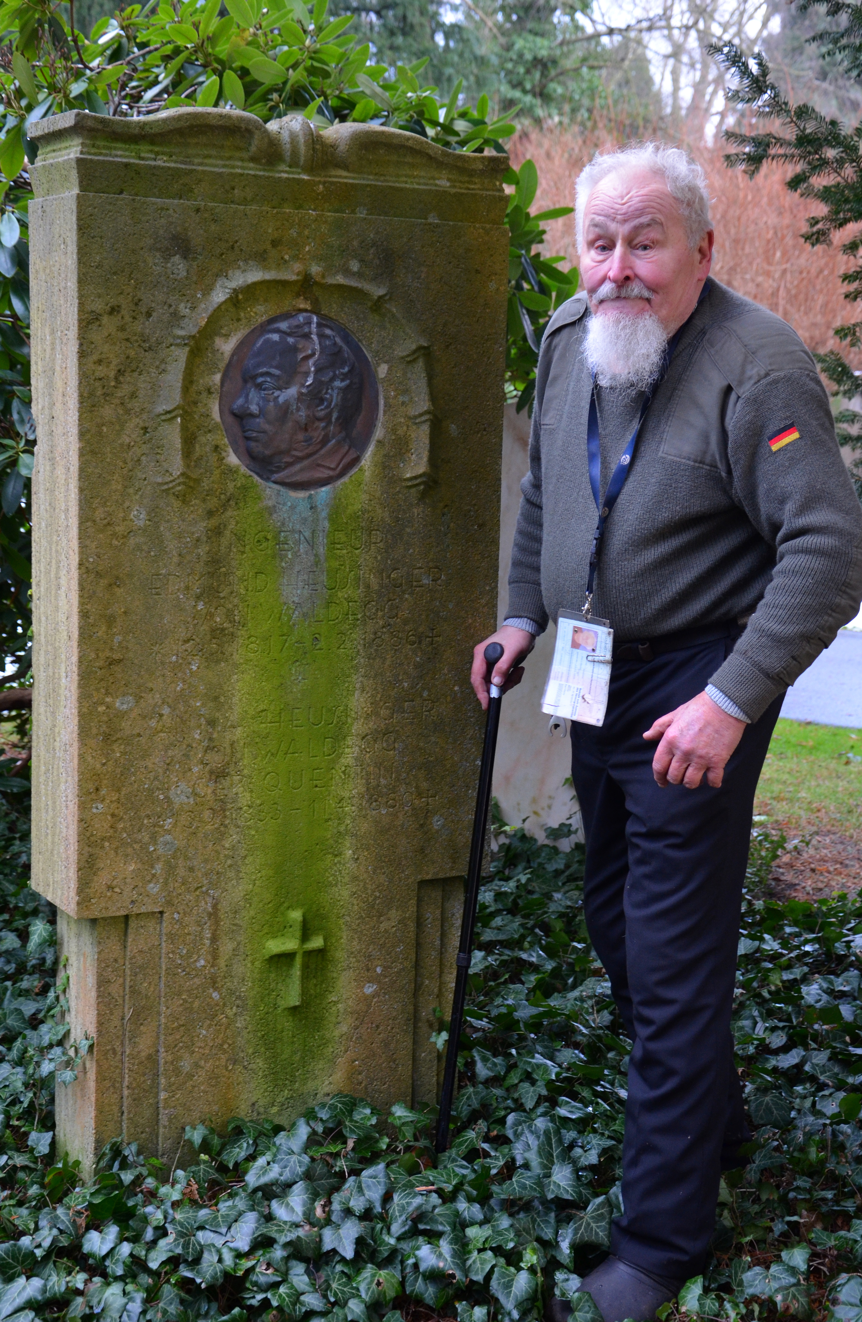 Am 31. Januar 2015 suchte der Dipl.-Ing. Karl-Heinz Müller das Wikipedia-Büro Hannover auf, um auf das Grabmal des Ingenieurs und Erfinders Edmund Heusinger von Waldegg aufmerksam zu machen. Noch am selben Tag wurde auf dem Stadtfriedhof Engesohde wurden die Fotos vor Ort getätigt ...